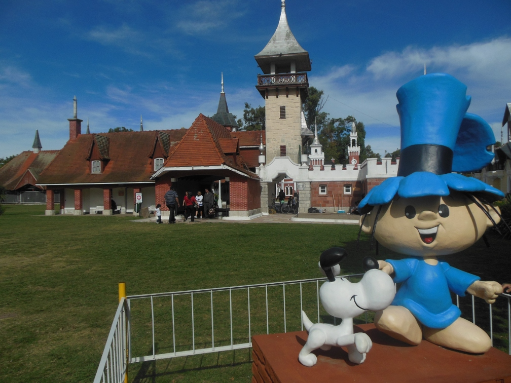 Monumento a Hijitus en la República de los Niños